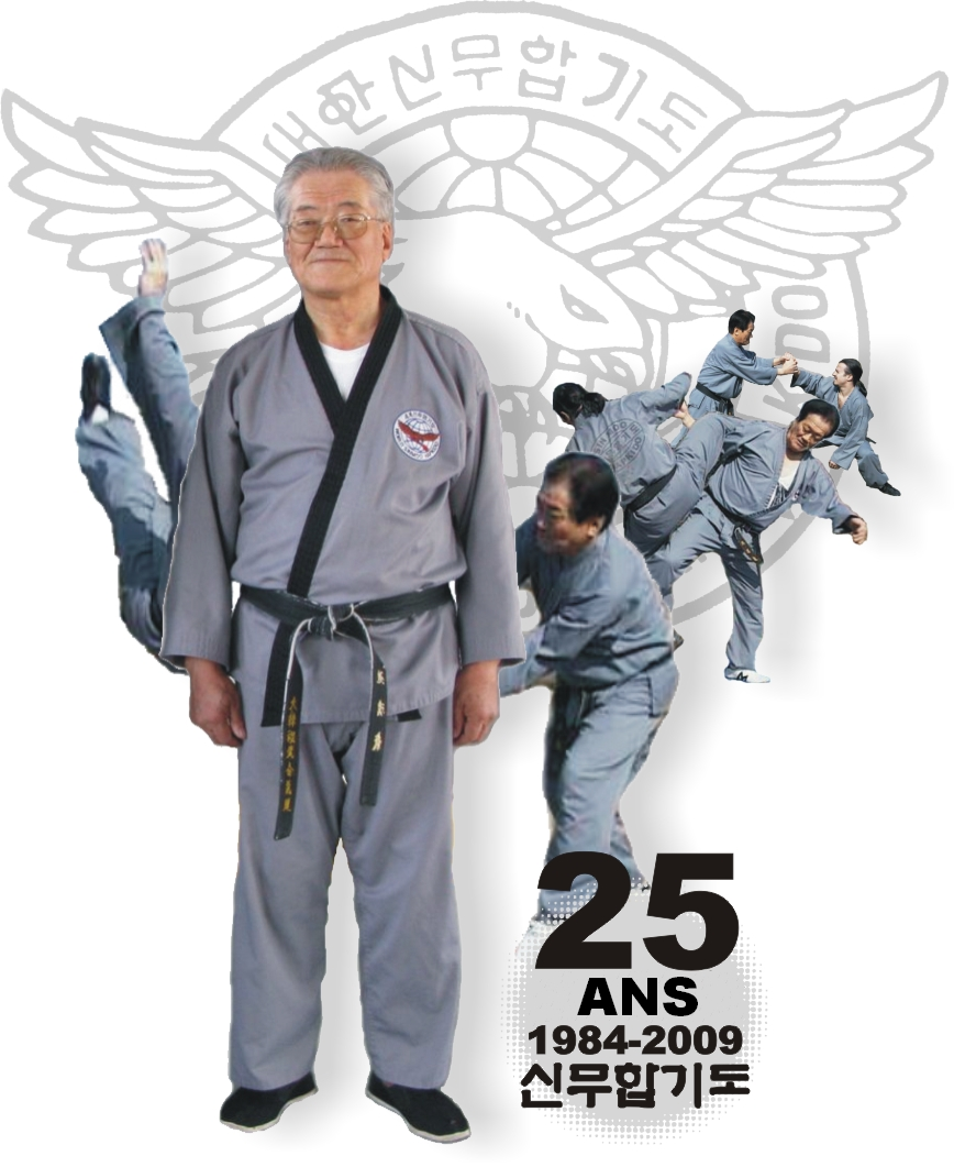 Fait pour les 25 ans d'existence du Sin Moo Hapkido (DoJuNim Ji Han Jae avec comme partenaire GM Nicolas TACCHI)